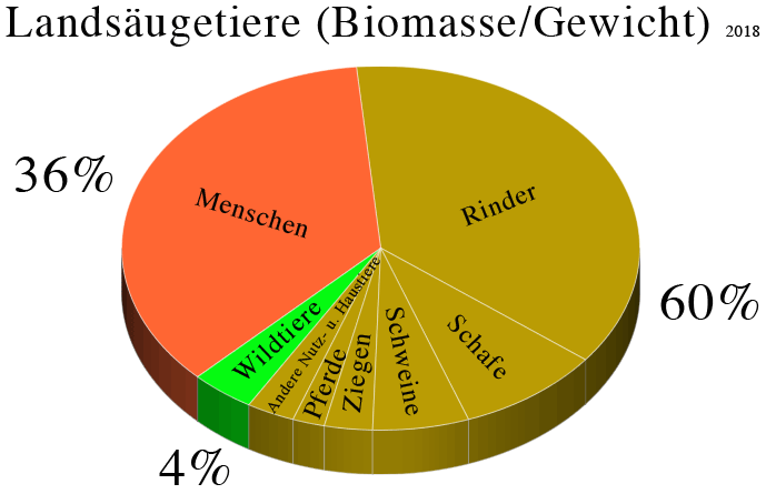 Biomasse der Landsäugetiere der Erde 2018